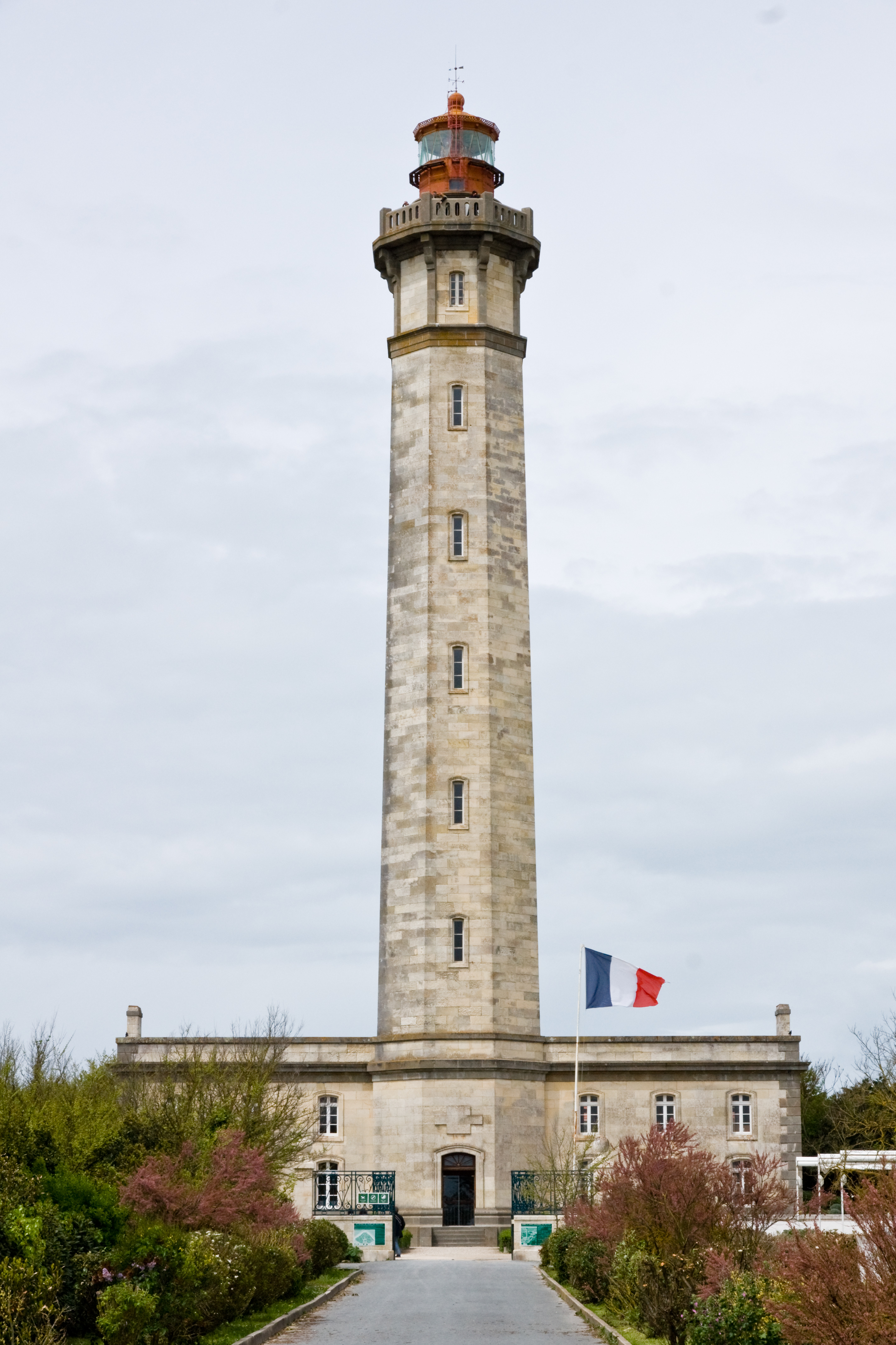 Phare des Baleines - Ile de Ré